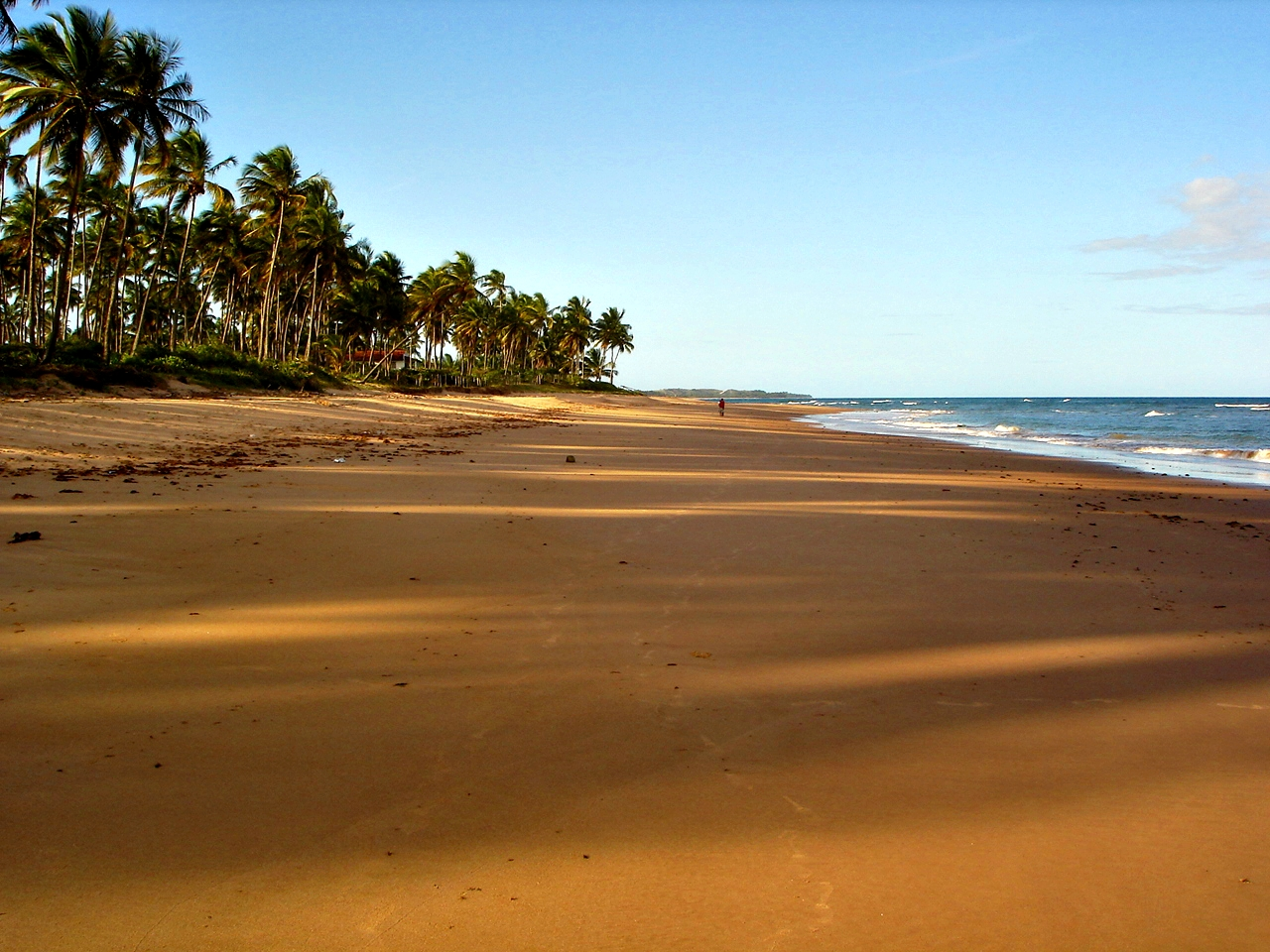 Praia do Cassange, Maraú, Bahia